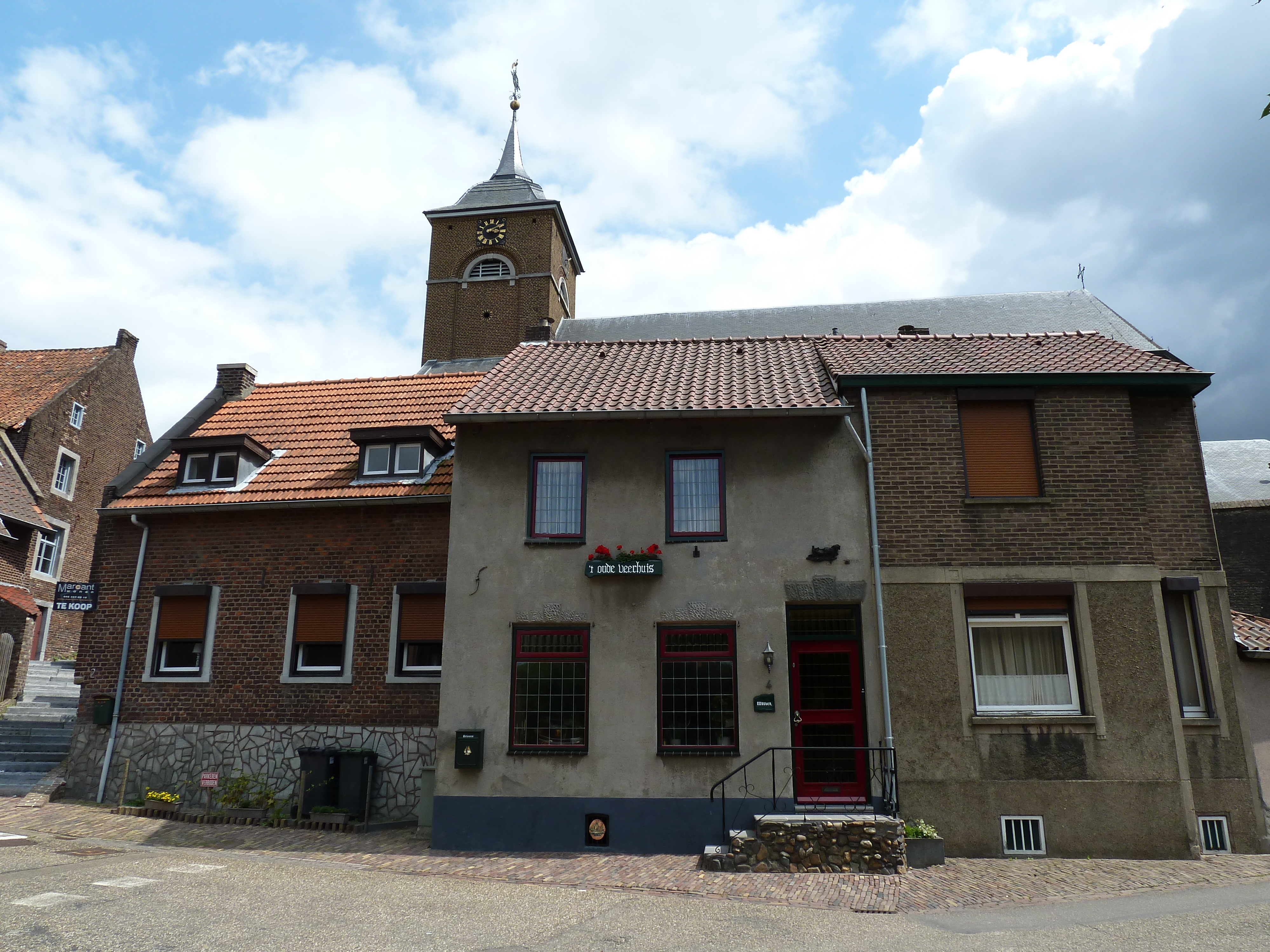 Urmonder Maasstraat 4, Urmond, Limburg, Nederland